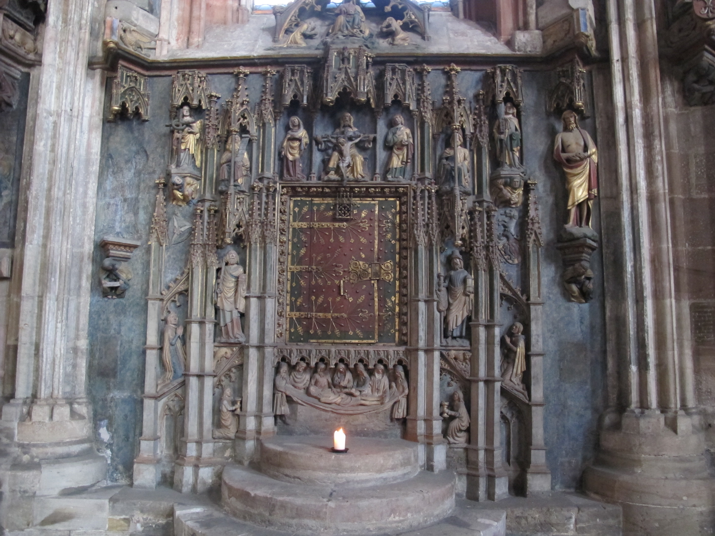 St. Sebald, Nuremberg, nicchia sacramentale del 1375 circa